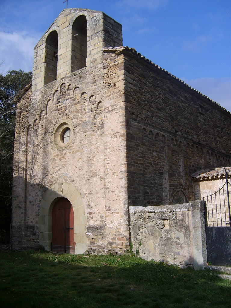 Sant Pere de Savassona